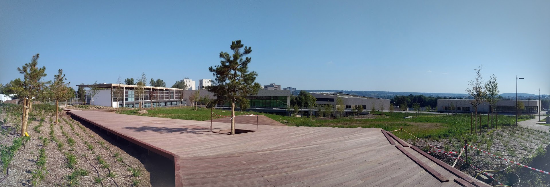 Panorama